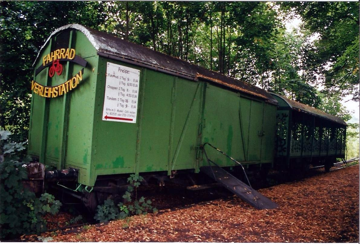 Ausgemusterte Wagons auf stillgelegten Gleisen am Ratzeburger Bahnhof